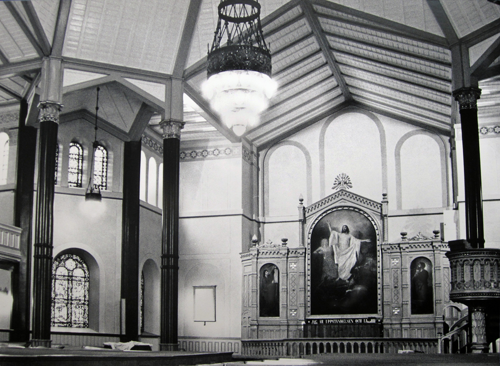 Caroli kyrka i Malmö - nyrenoverad 1990.